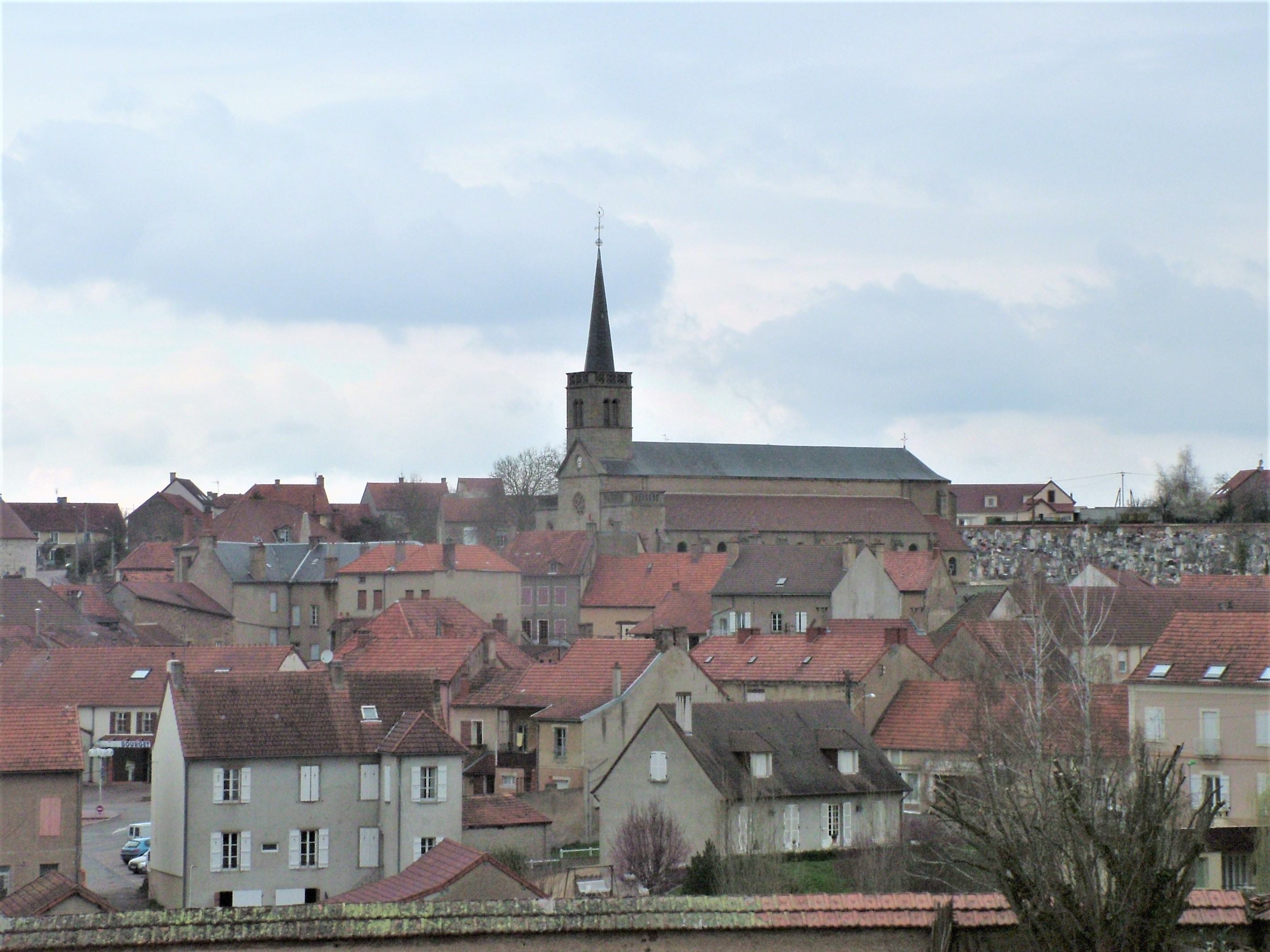 Epinac (Saône-et-Loire) - Vue générale du centre-ville